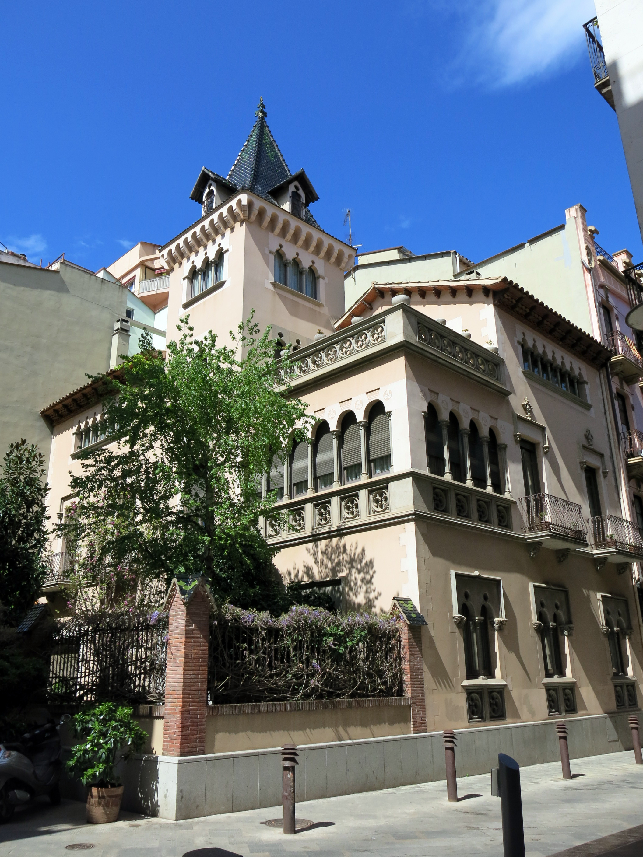 Xalet Juandó (Girona)